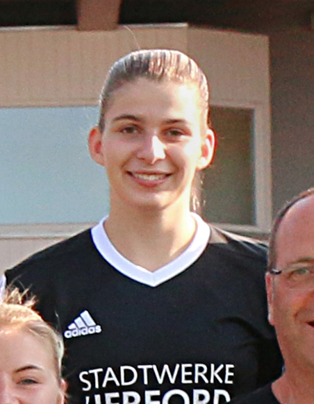 Herforder SV Borussia Friedenstal Team 2014/2015